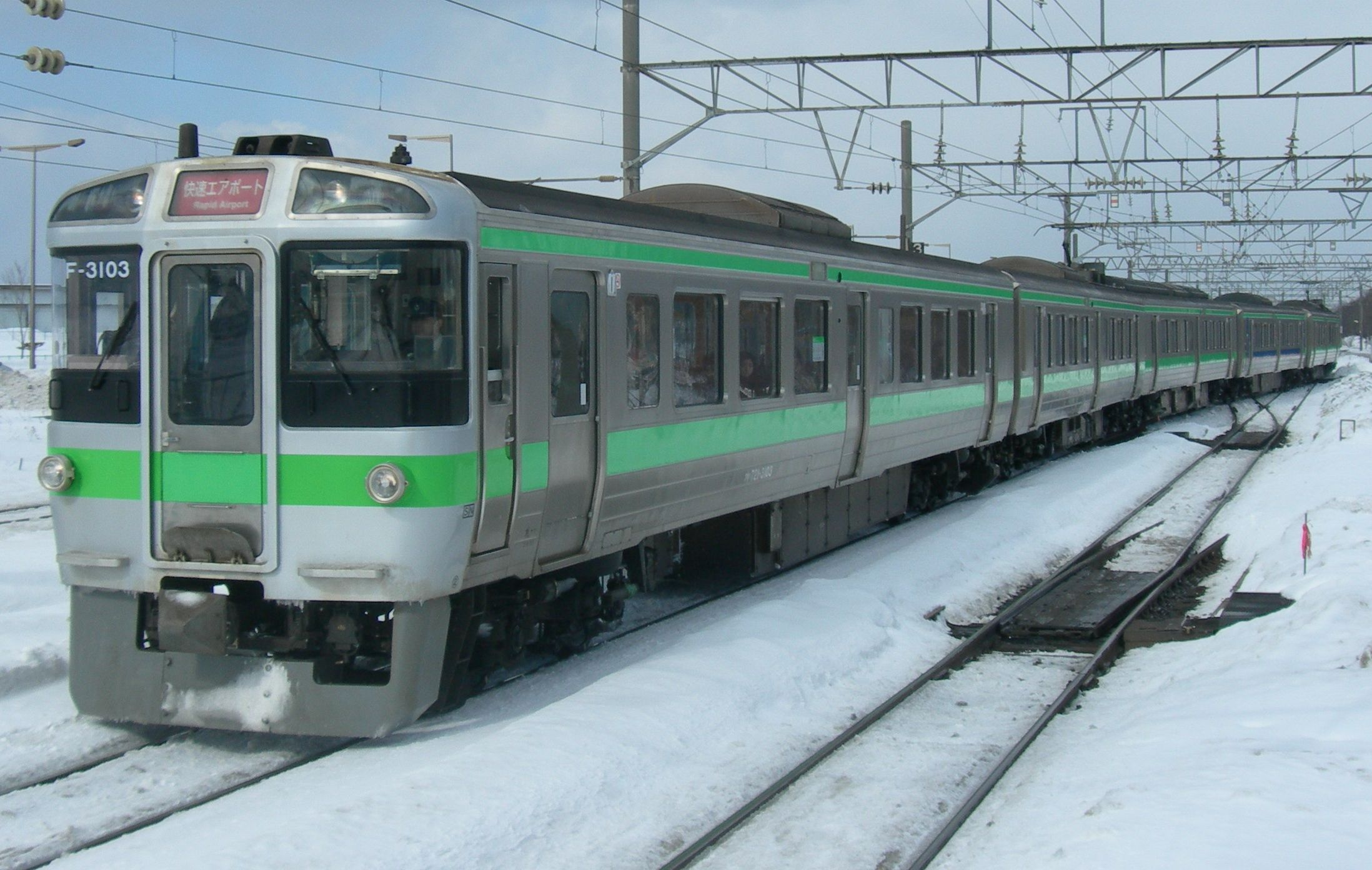 JR北海道721系快速「エアポート」